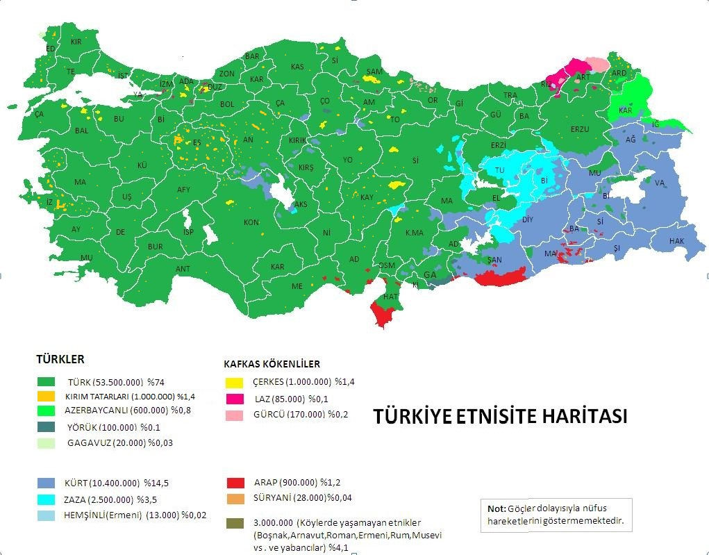 Türkiye etnik haritası